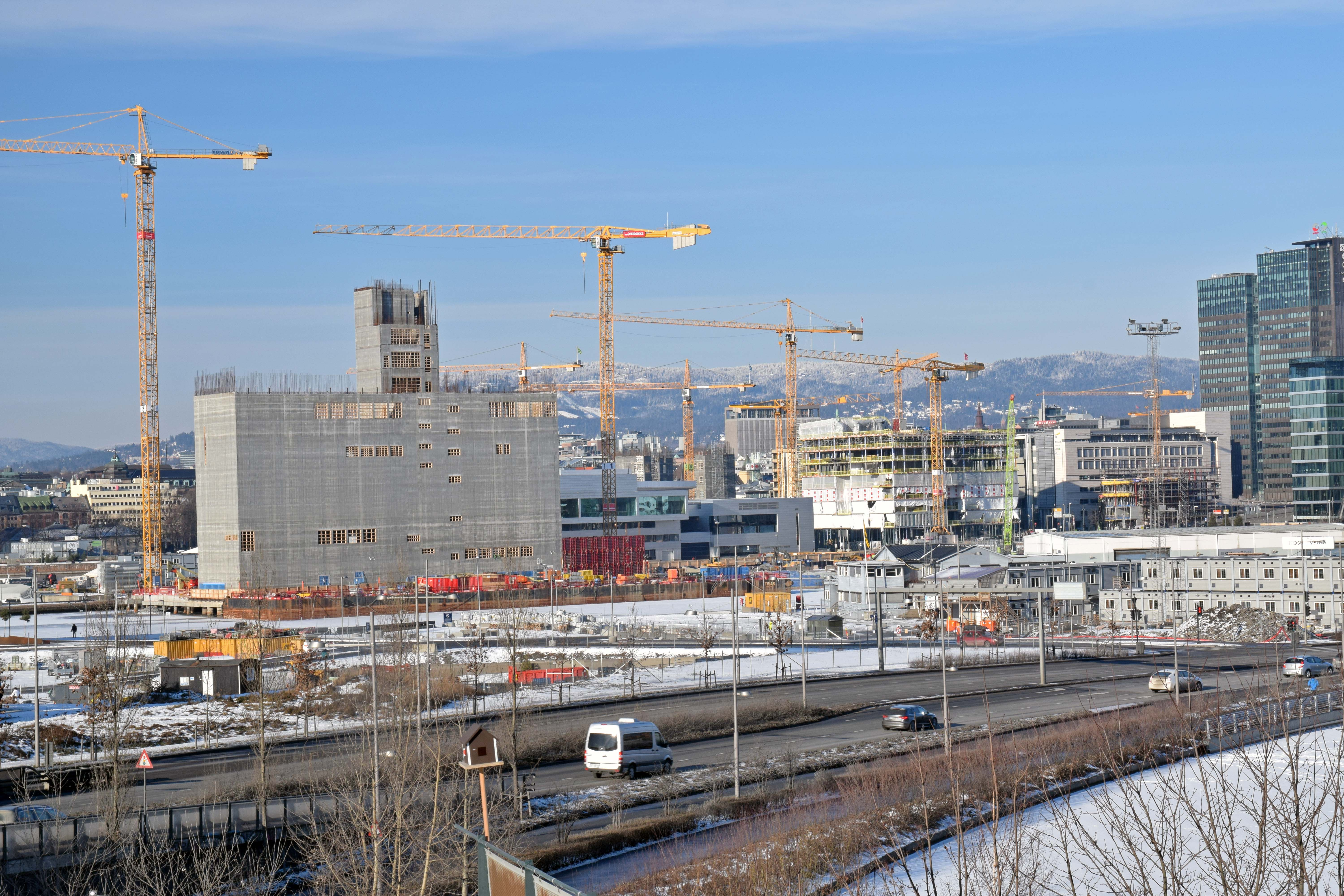 Lambda, nye Munchmuseet, sett fra gamle Sørenga bru